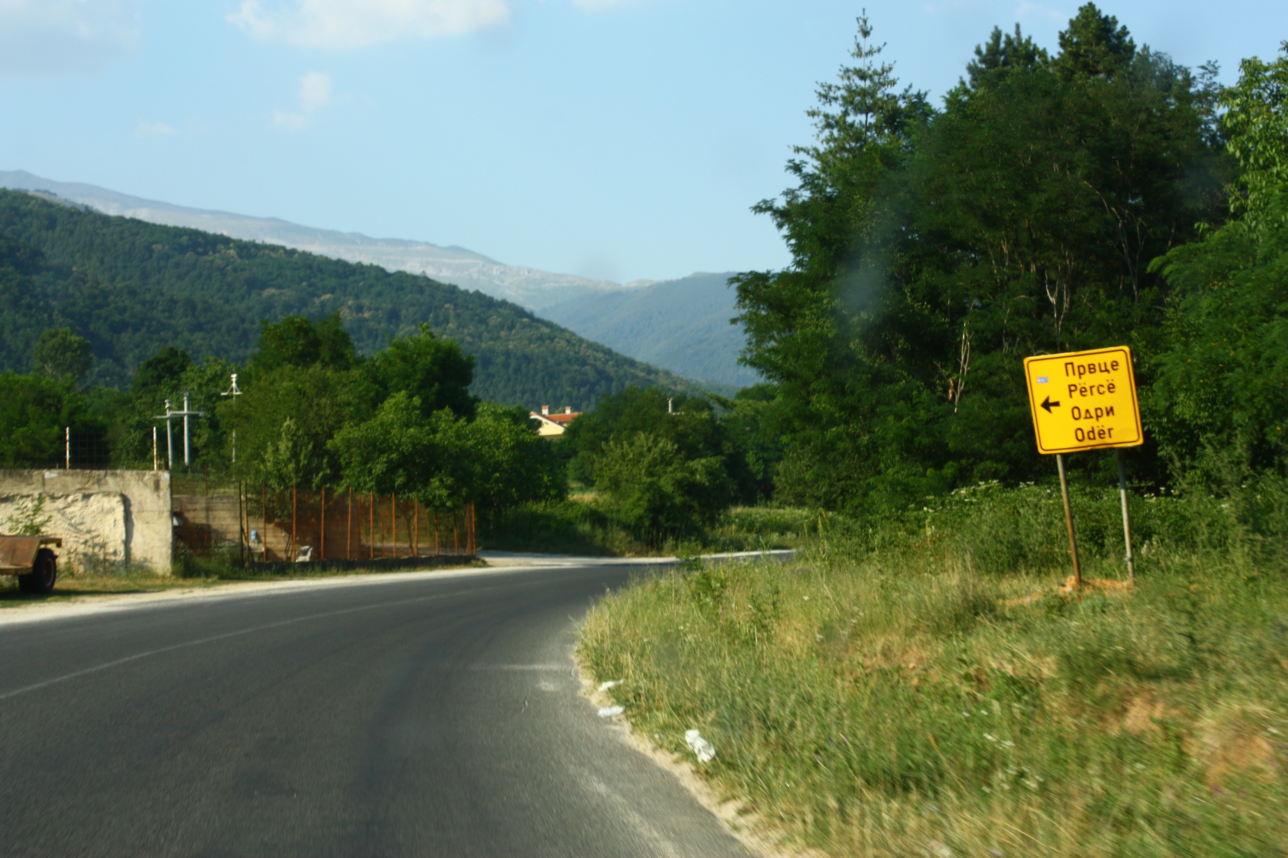 Odri, Macedonia